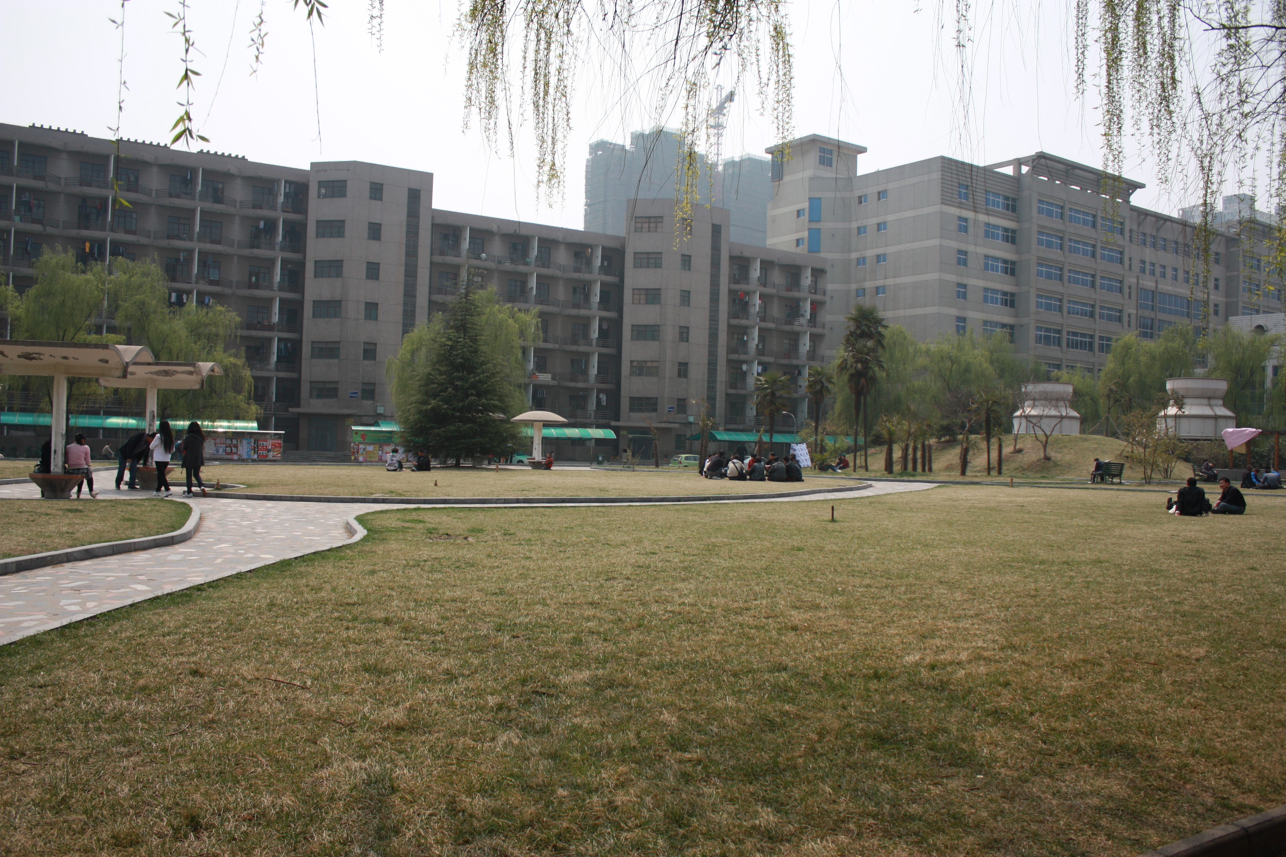 西安交通大学南草坪及管院大楼